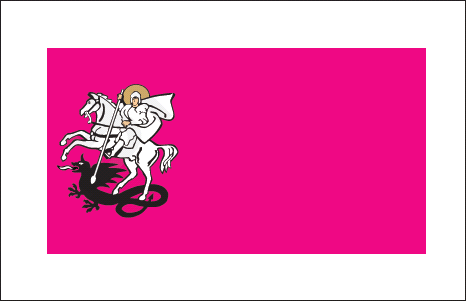 Прапор Ніжинського району